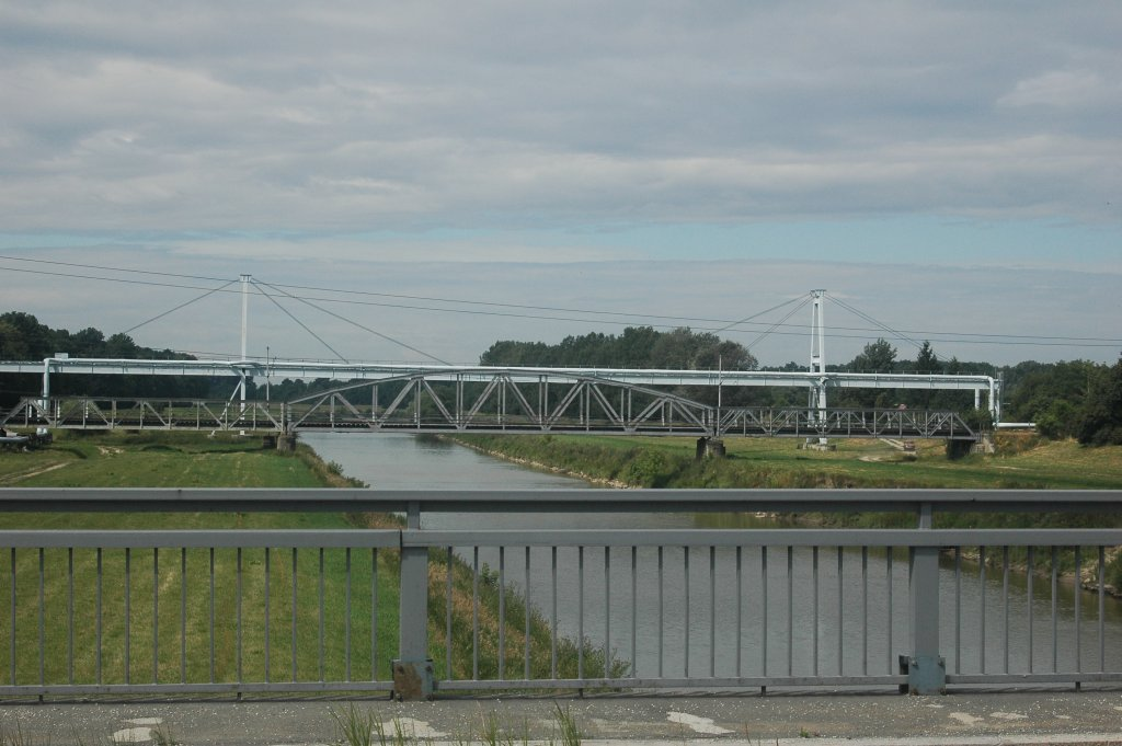 Morava between Slovak Holíč and Czech Hodonín